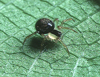 female Dipoena flavomarginata from Okinawa.